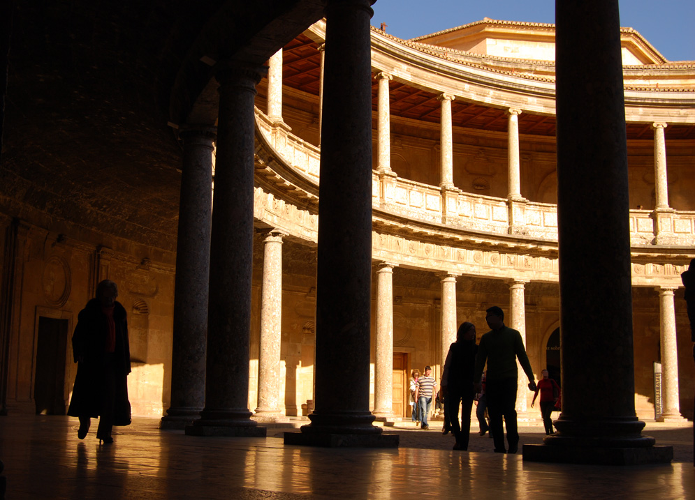 Palacio de Carlos V, en Granada (España)